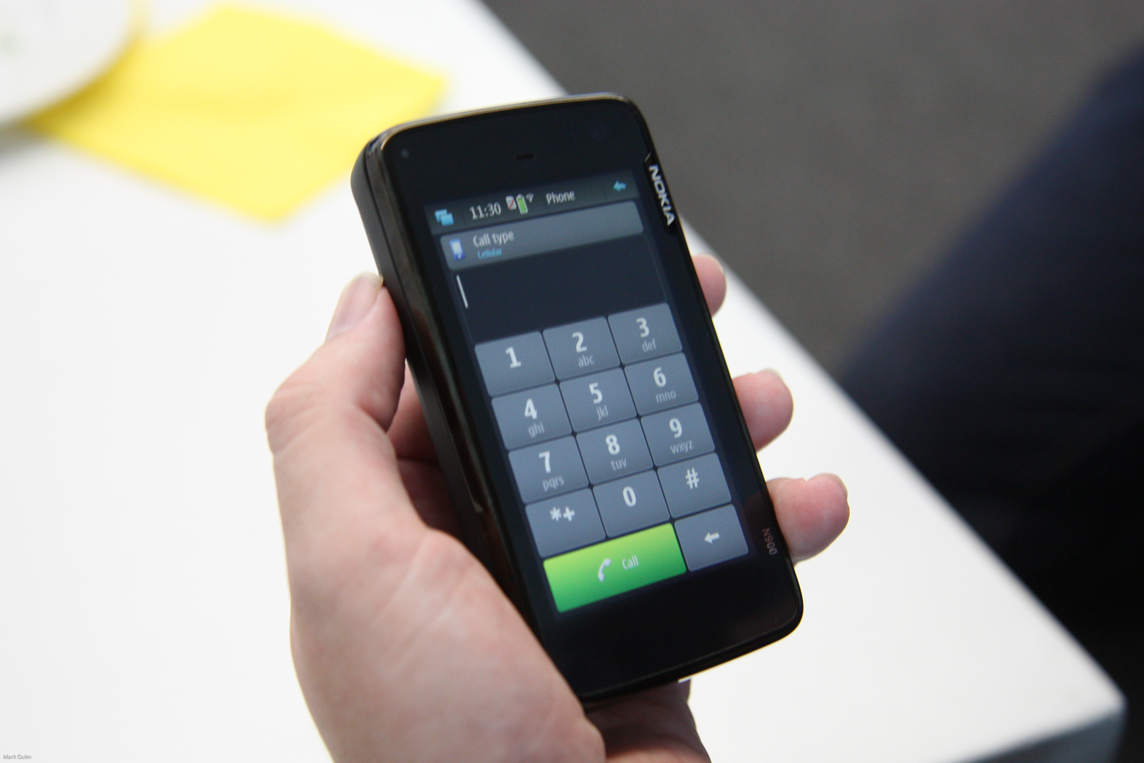 Nokia N900, dial mode.